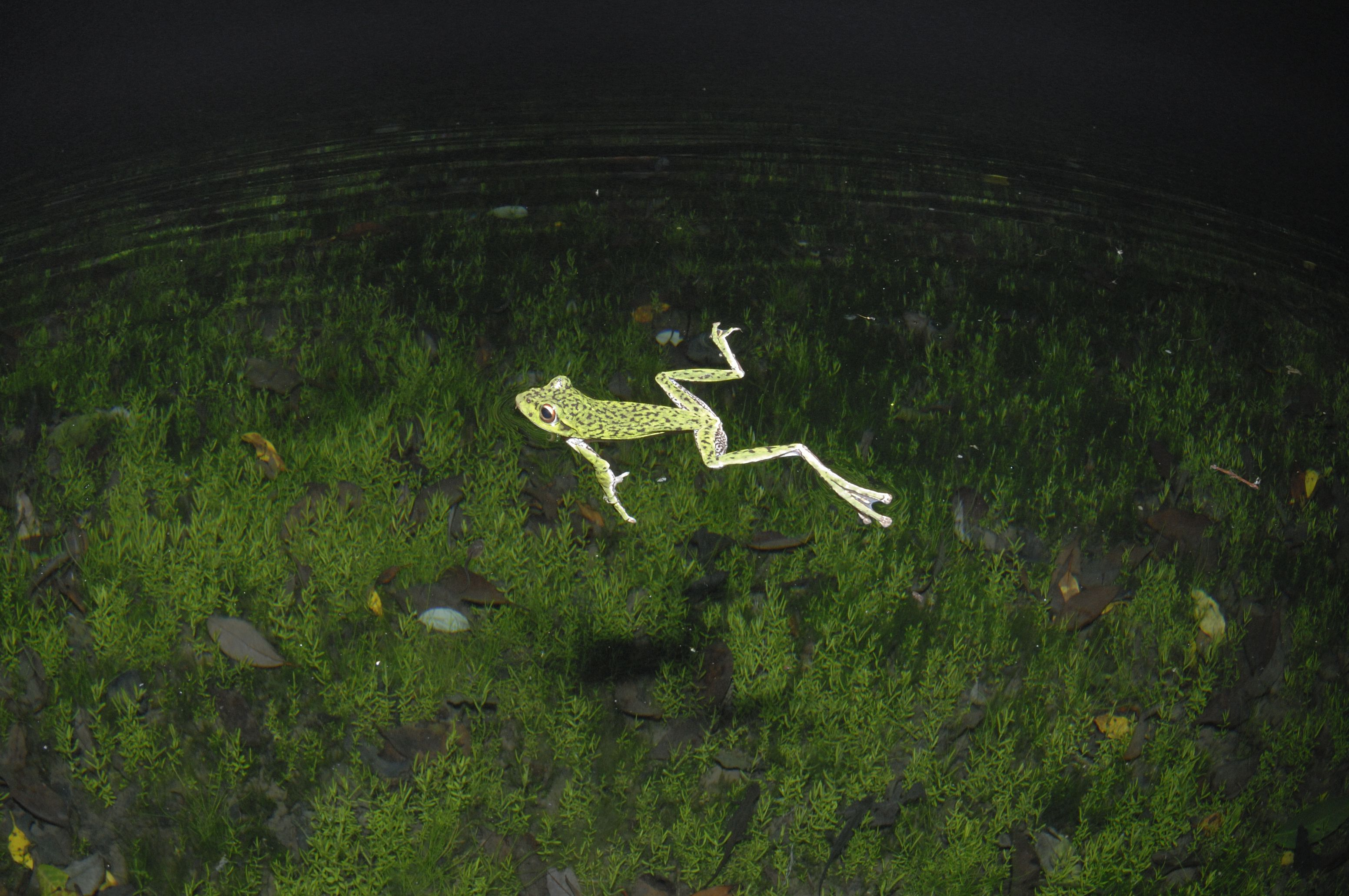 深夜の湧水に浮くモリアオガエル（大台ヶ原）。詳細